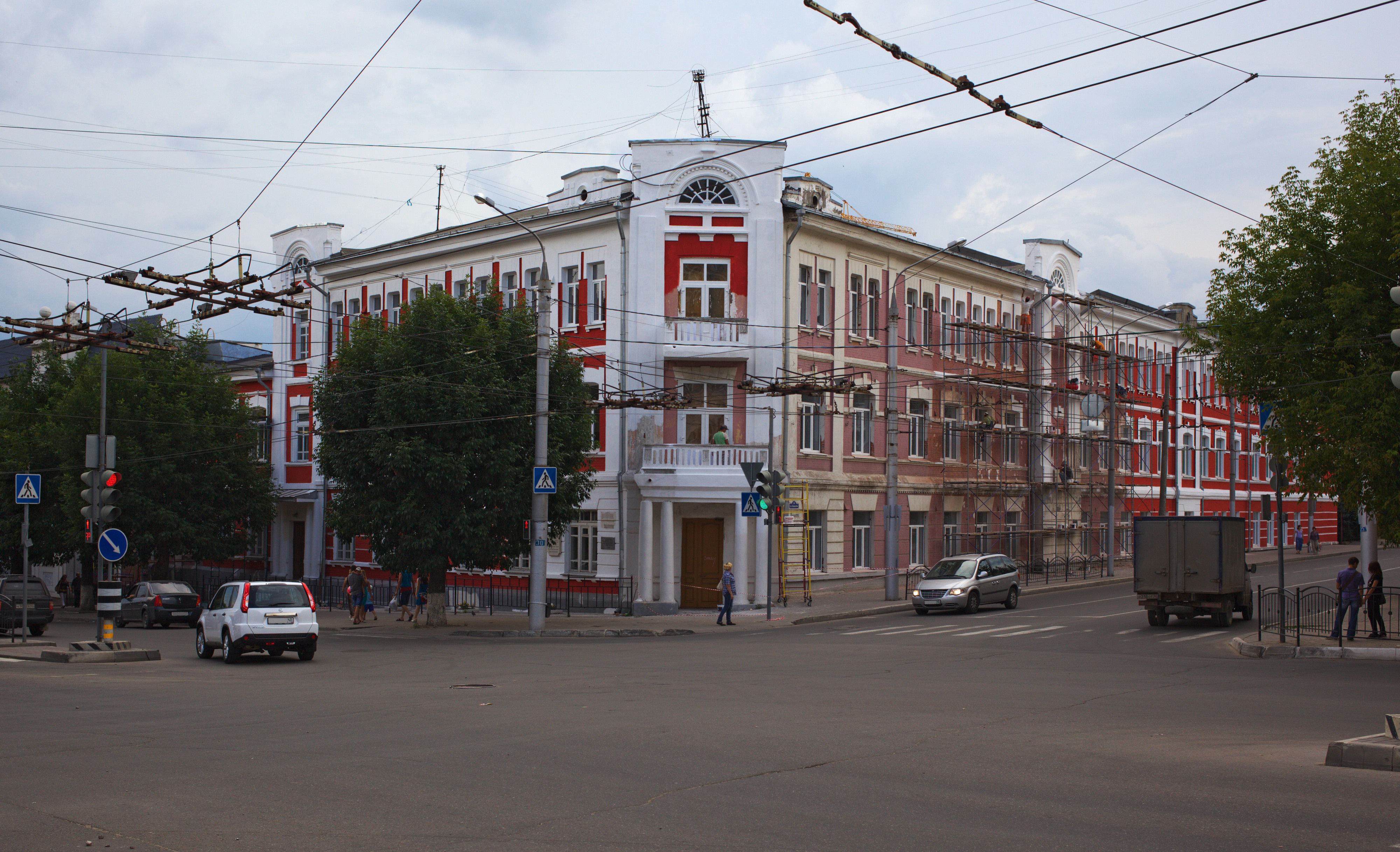 Калуга, школа на углу Королёва и Гагарина. Десяток мемориальных досок, но не охраняемый памятник